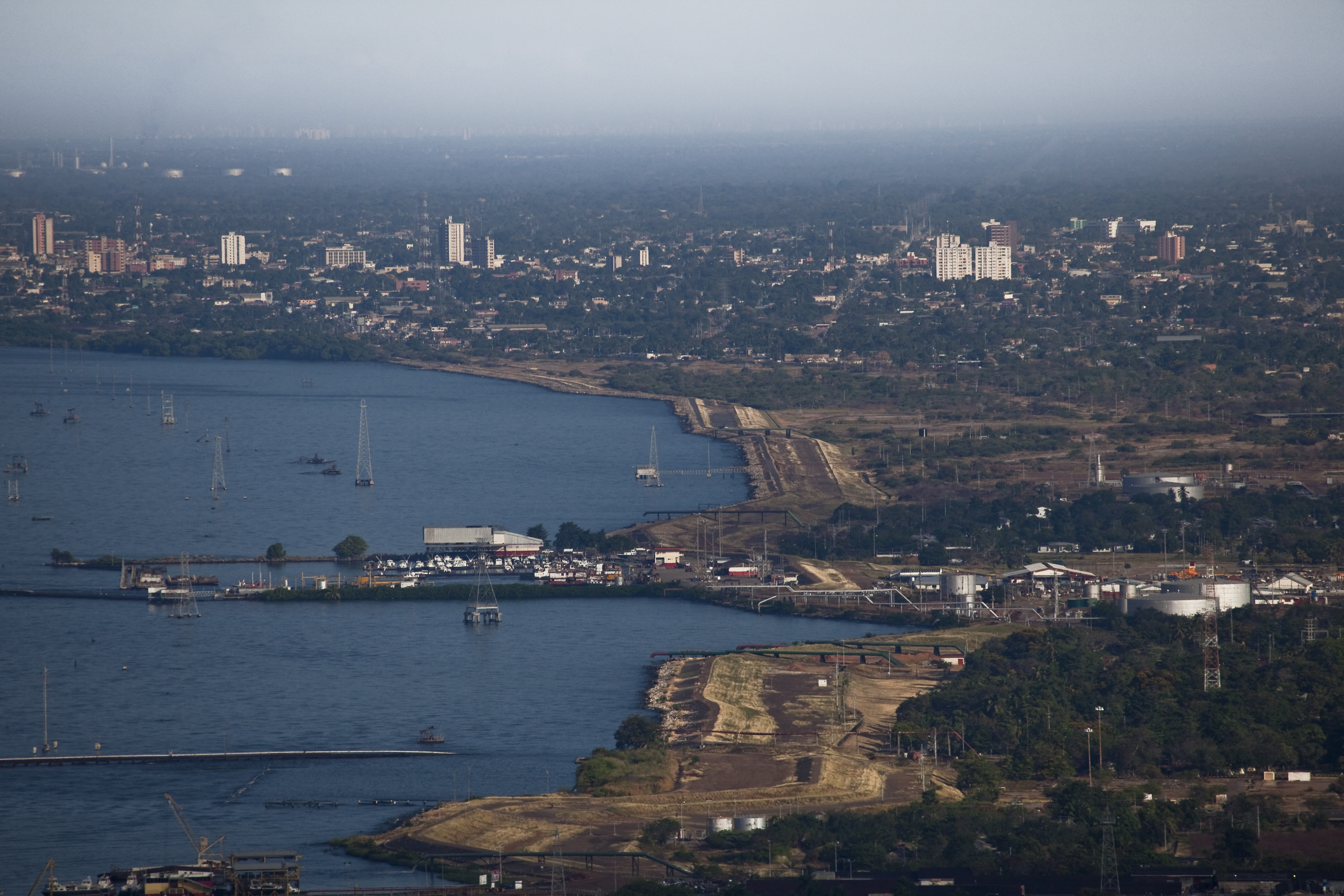 Vista aérea del Muro de Contención Lagunillas